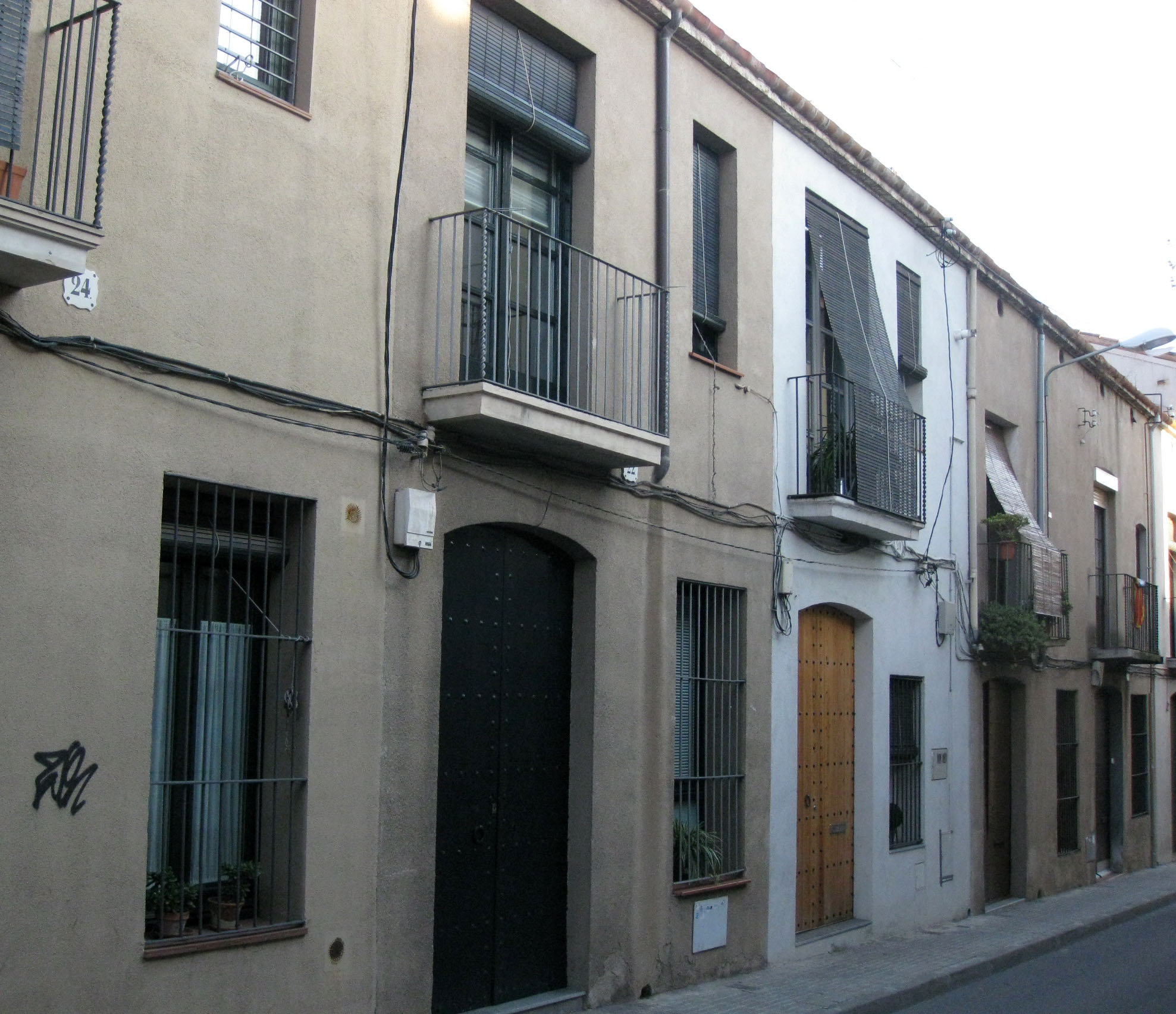 Conjunt de cases obreres de Cal Mauri, al carrer del Passeig núm. 4-42 (Terrassa). Detall de les cases del núm. 16 al 24.